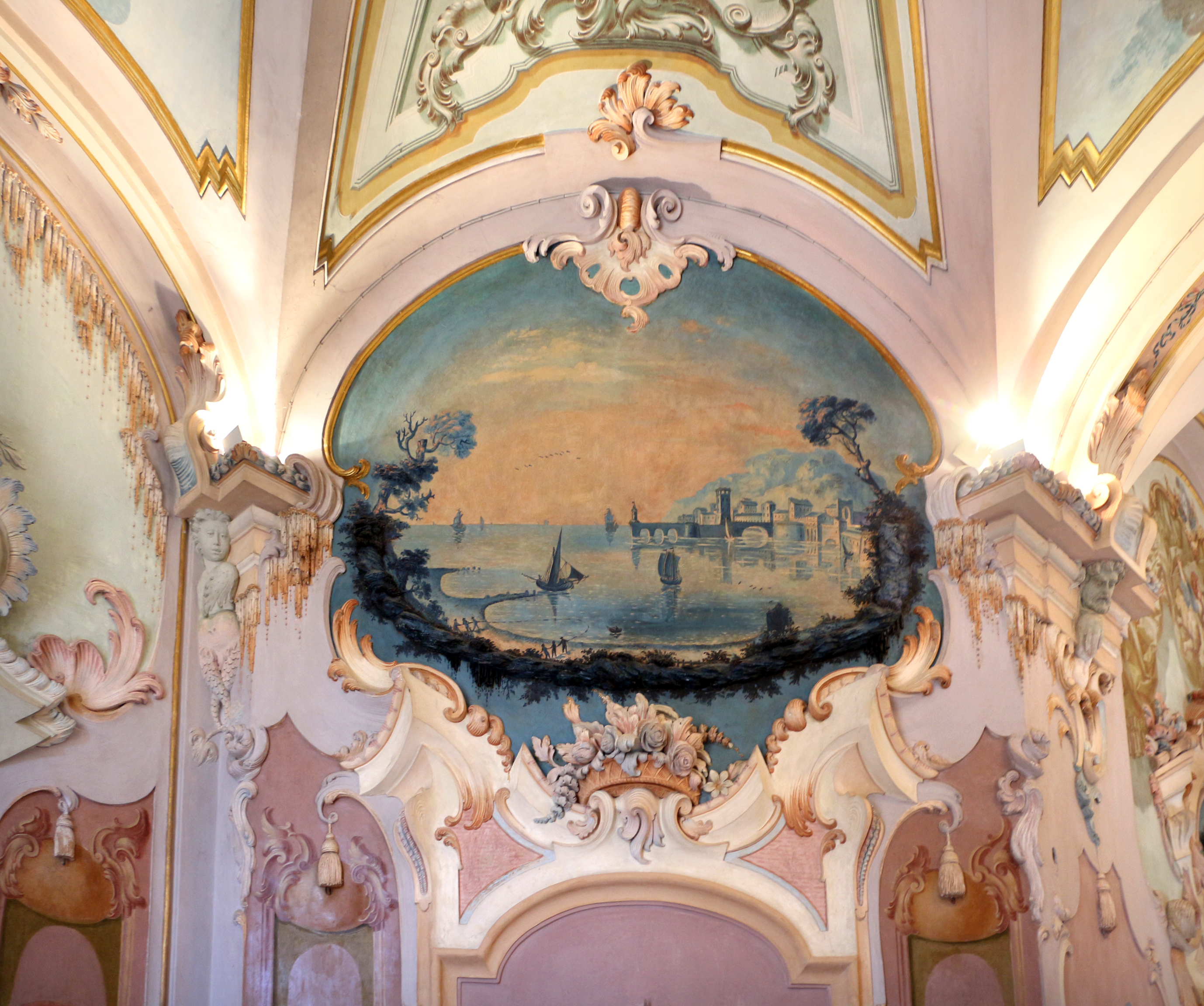 Pinacoteca Civica, Palazzo Pianetti This is a photo of a monument which is part of cultural heritage of Italy.